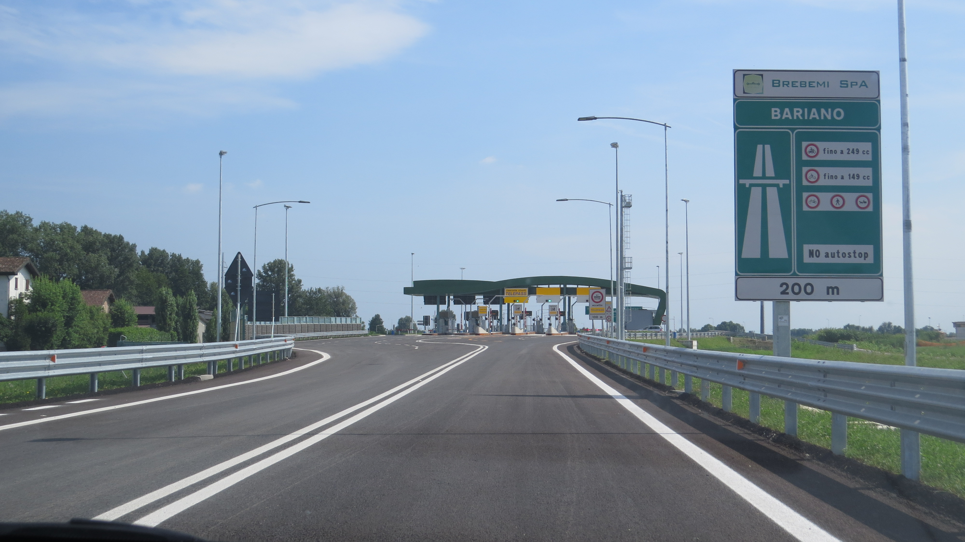 Casello di Bariano presso BreBeMi - A35